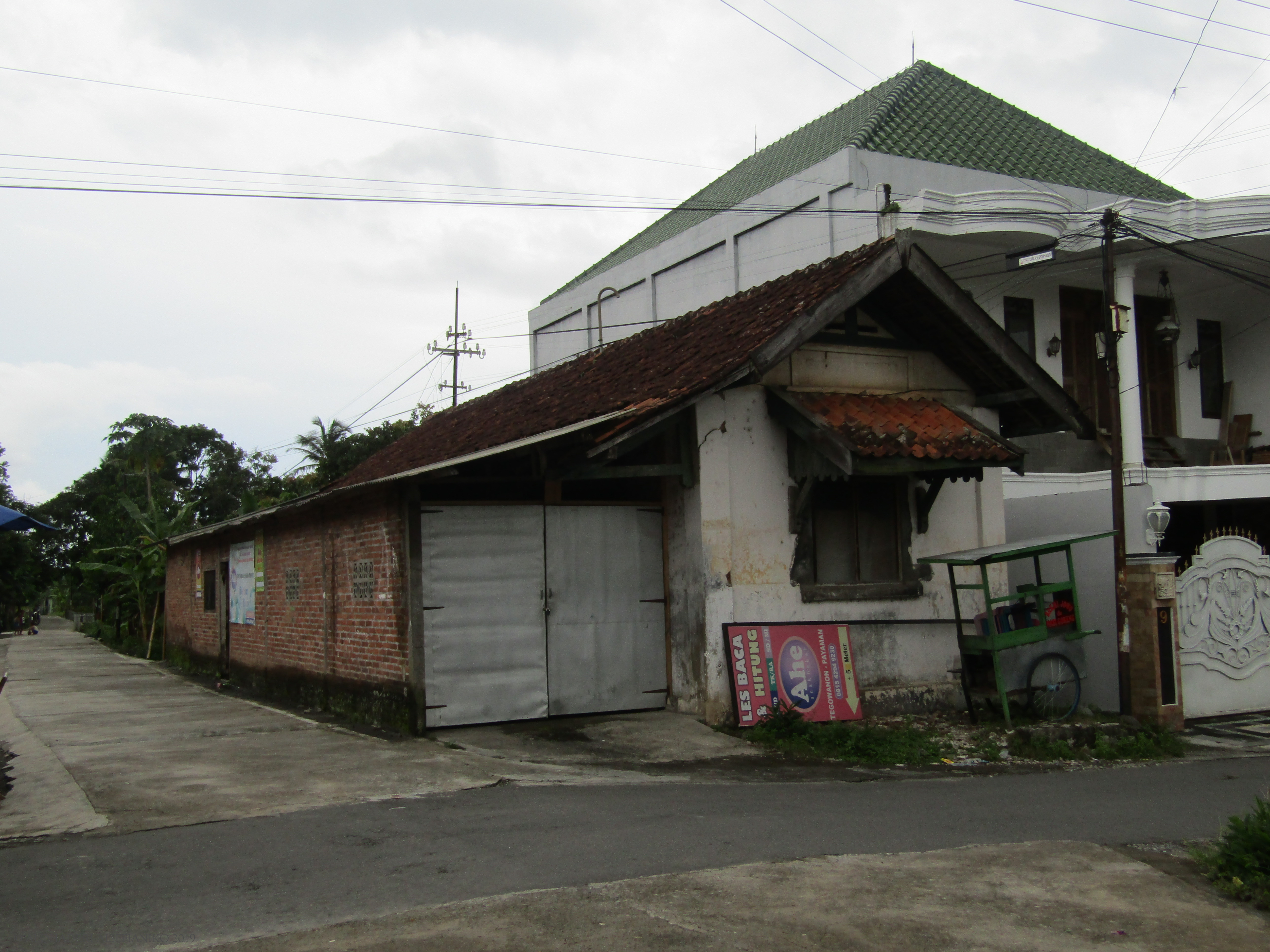 Tampak perspektif Stasiun Payaman, 2019